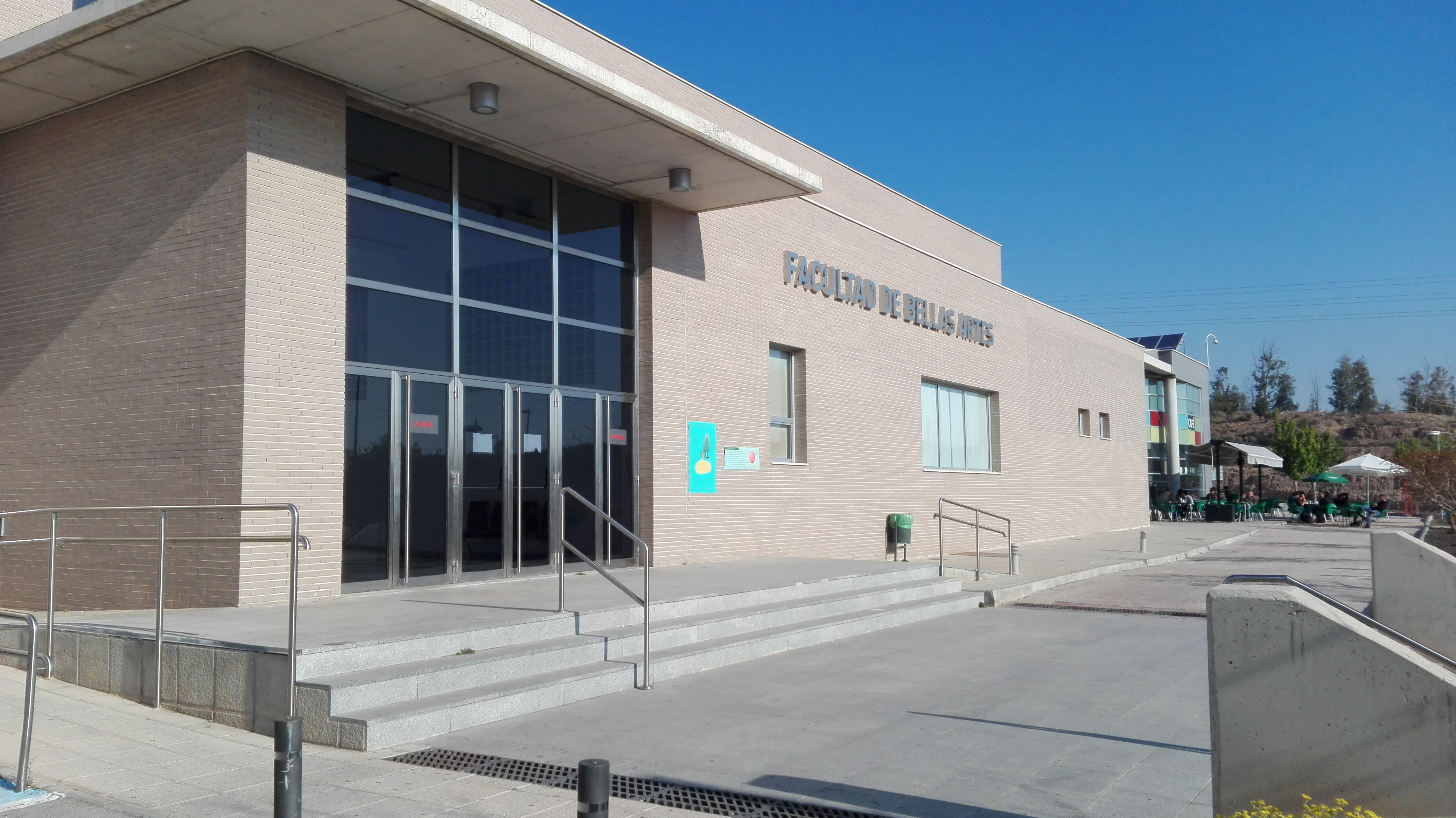 Entrada facultad de BBAA